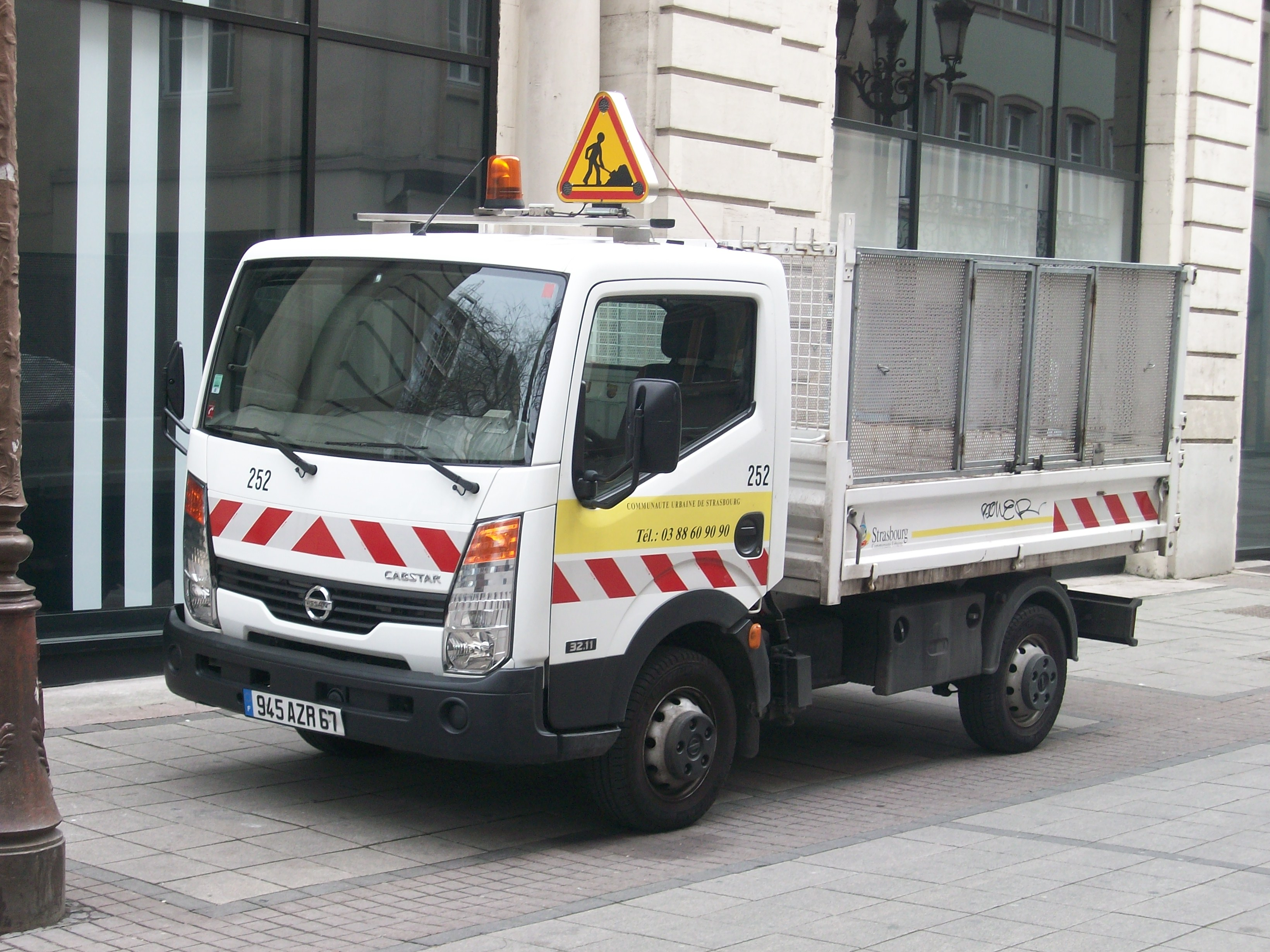 Nissan Atlas F24/Cabstar du service Propreté Urbaine appartenant à la ville de Strasbourg